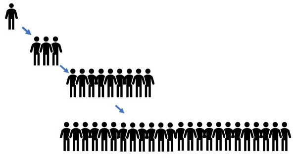 "הדבקה חברתית היא התפשטות של מחשבות, רגשות והתנהגויות מאדם לאדם ובין קבוצות גדולות יותר המושפעות על ידי מידע משותף וחיקוי" The Influence of Social Contagion and Technology"- "on Epidemic Non-Suicidal Self-Injury Paul M. Kirsch